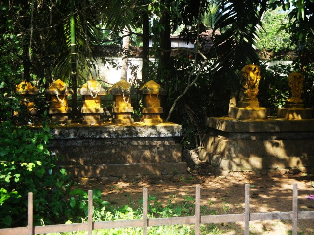 വാഴപ്പള്ളി-സർപ്പ പ്രതിഷ്ഠ